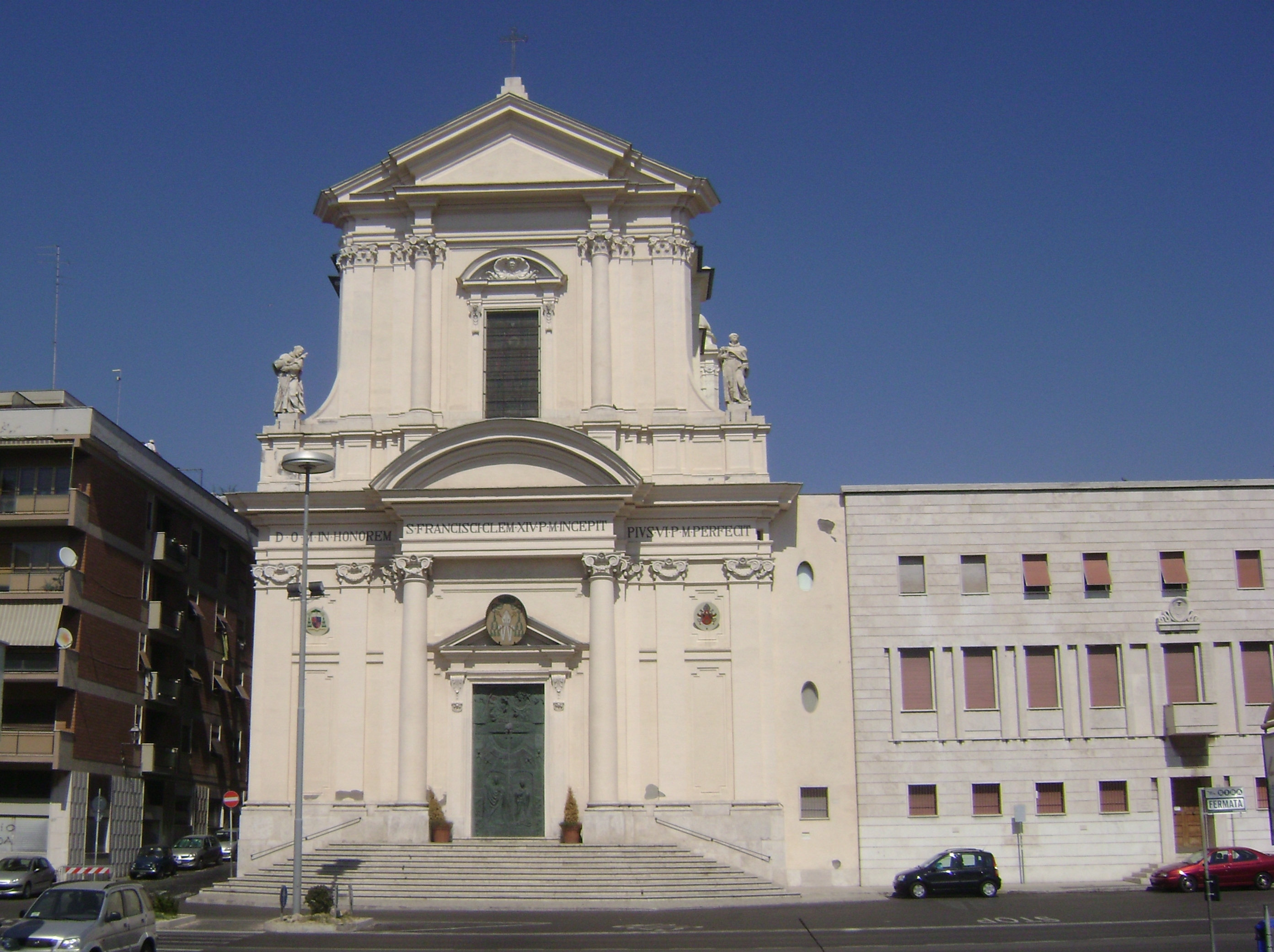 Facciate della Cattedrale di San Francesco in Civitavecchia